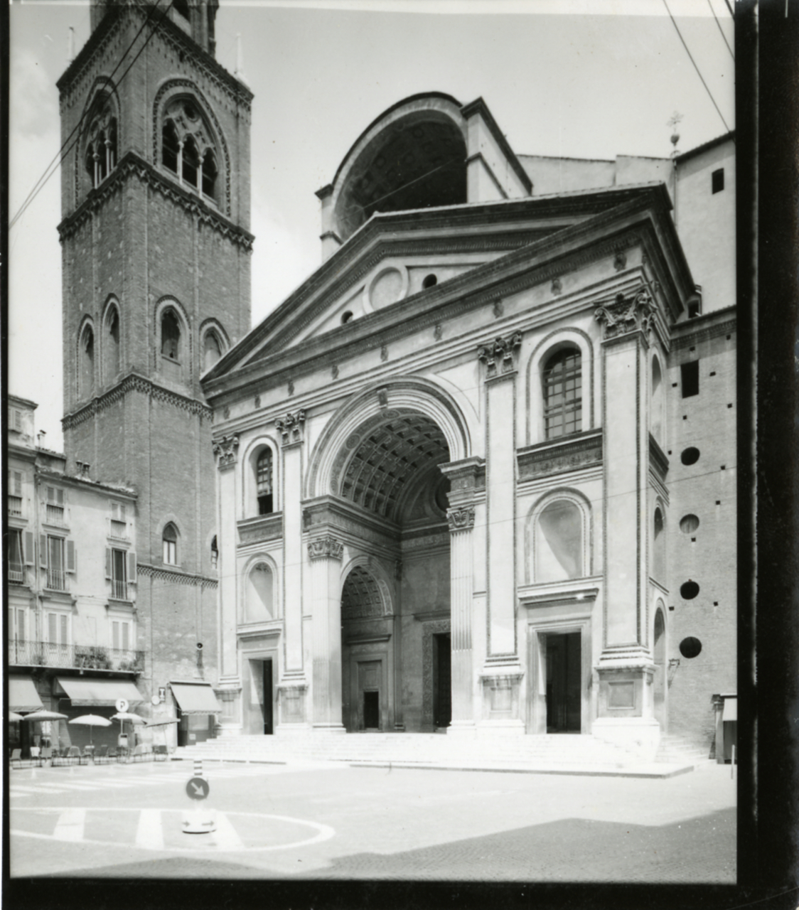 Mantova. Leon Battista Alberti. Basilica di Sant'Andrea. Esterni e interni. Servizio fotografico : Mantova, 1972 / Paolo Monti. - Fototipi: 13 : Positivo b/n, gelatina bromuro d'argento/ carta, provino a contatto da pellicola 10x12. - ((Serie costituita da 13 provini a contatto di negativi identificati con i nn.: 17451, 17451bis, 17453, 17454, 17456, 17458, 17459, 17464, 17466, 17467, 17468, 17468bis, 17469. - La suddetta serie è contenuta nella scatola dei contatti identificata con il n. 05; sul coperchio iscrizione didascalica manoscritta a pennarello nero: "Contatti/ Archit.". - Occasione: Documentazione per la pubblicazione: Pica Agnoldomenico (a cura di), "Celebrazioni di Leon Battista Alberti, 1404-1472", catalogo della mostra, Roma 1972, Roma, Accademia nazionale di San Luca, 1972. - Fonte: Monografia di Pica, Agnoldomenico (a cura di): Celebrazioni di Leon Battista Alberti, 1404-1472, catalogo della mostra, Roma 1972, Roma (1972). Mostra tenutasi a Palazzo Carpegna di Roma. - Fonte: Fattura di Paolo Monti: IV. Commesse/ fattura n. 39 (1972/12/21), presso Archivio Paolo Monti